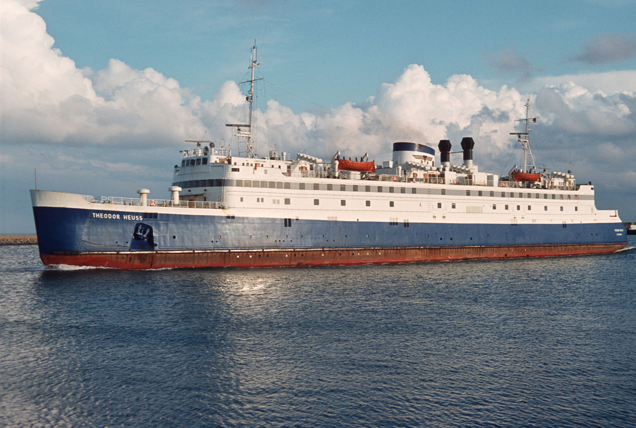 Fährschiff Theodor Heuss auf der Vogelfluglinie Puttgarden - Roedby im Juli 1981